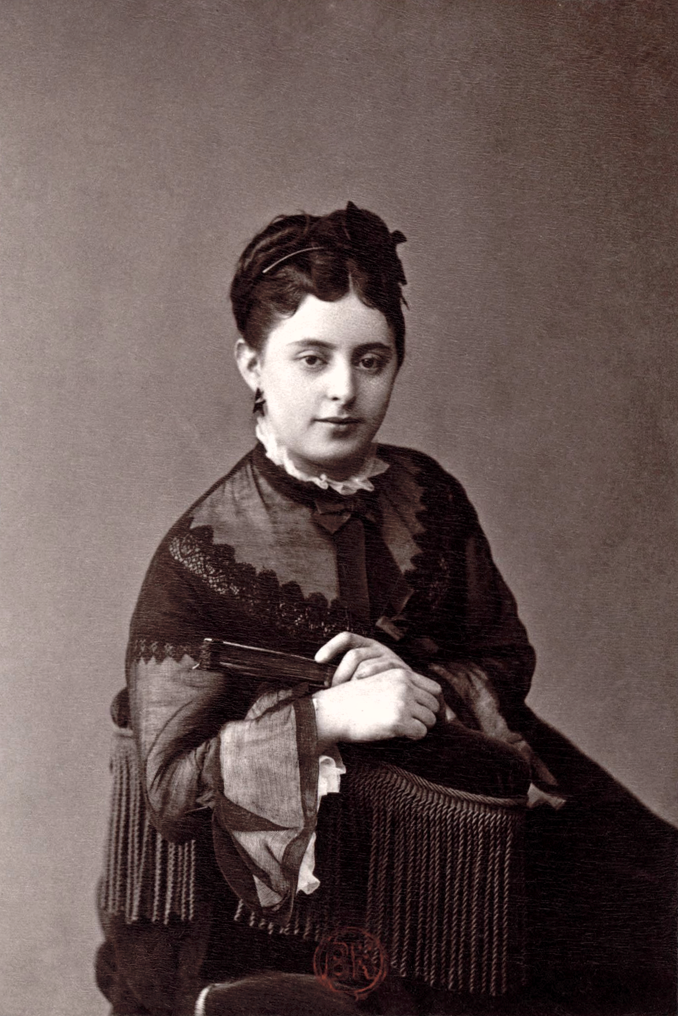 Marie Heilbron (1851–1886), Belgian operatic soprano.